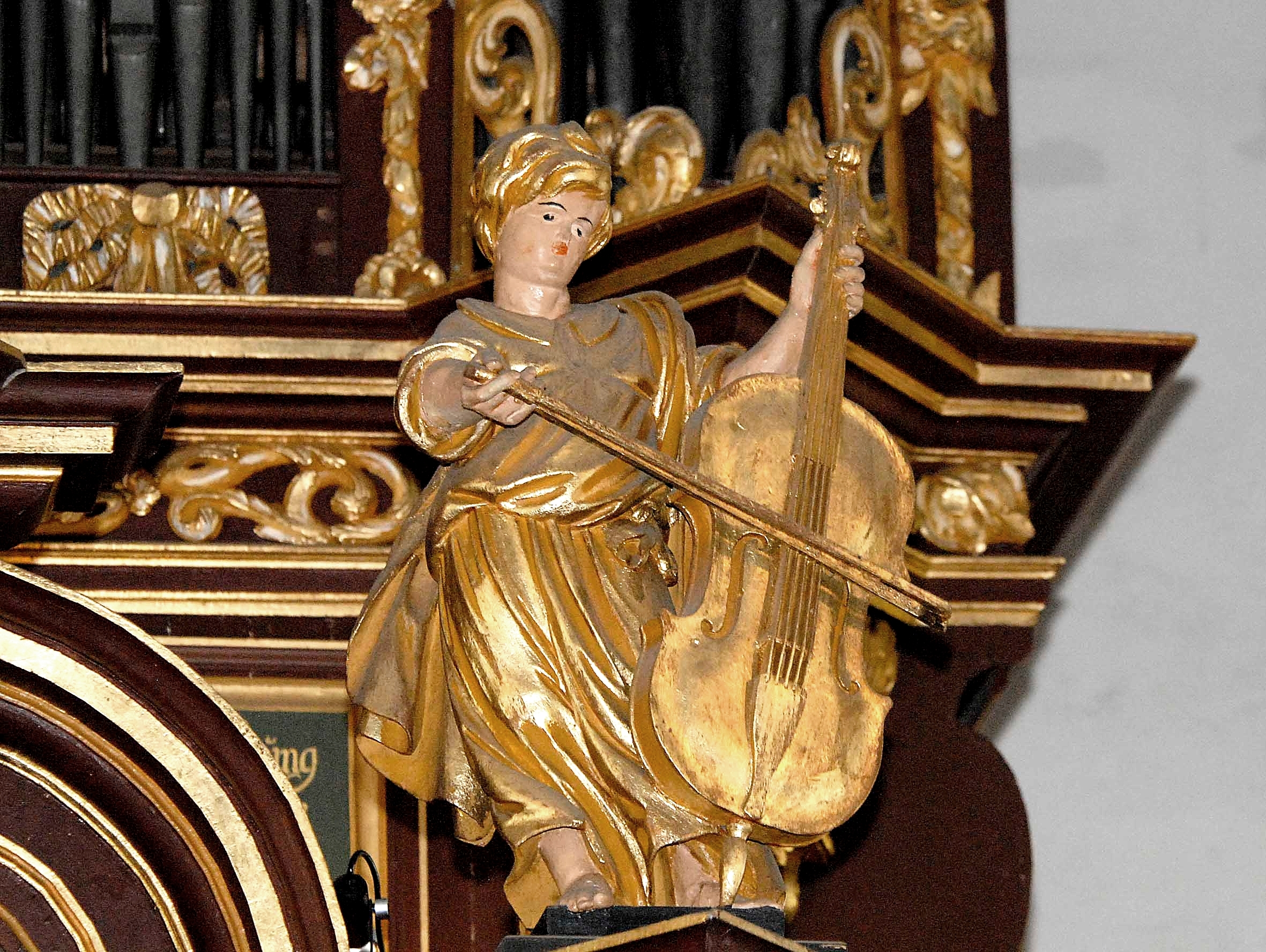 Schnitger Organ Cappel